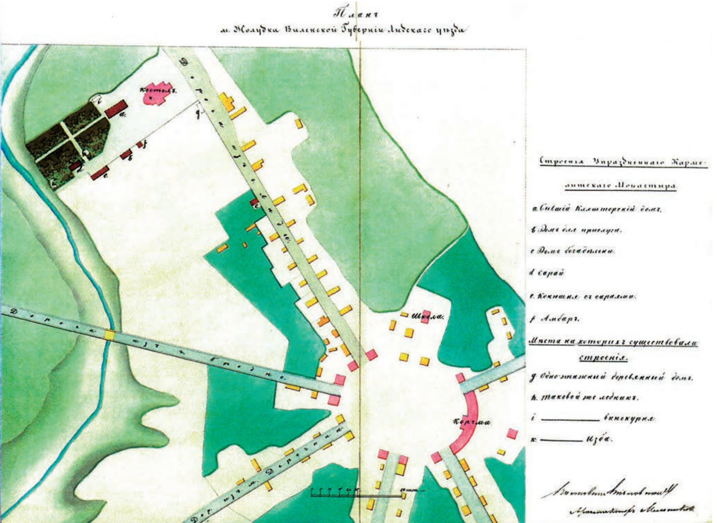 Беларуская (тарашкевіца): Жалудок (Žałudok). Плян мястэчка